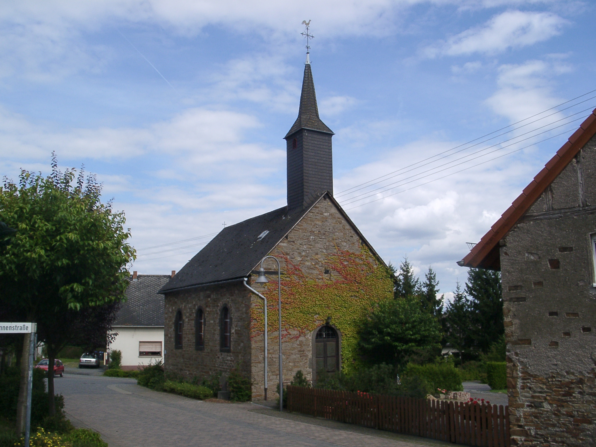 Kapelle von Ditscheid (Eifel) - selbst fotografiert (Klaus Graf) 13.8.2005